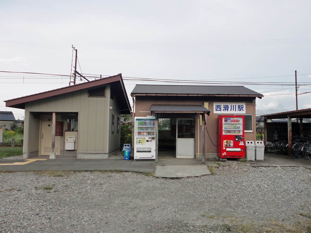 富山地方鉄道本線西滑川駅駅舎